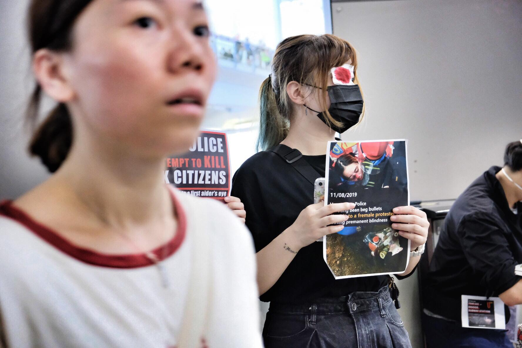 百萬人塞爆機場行動